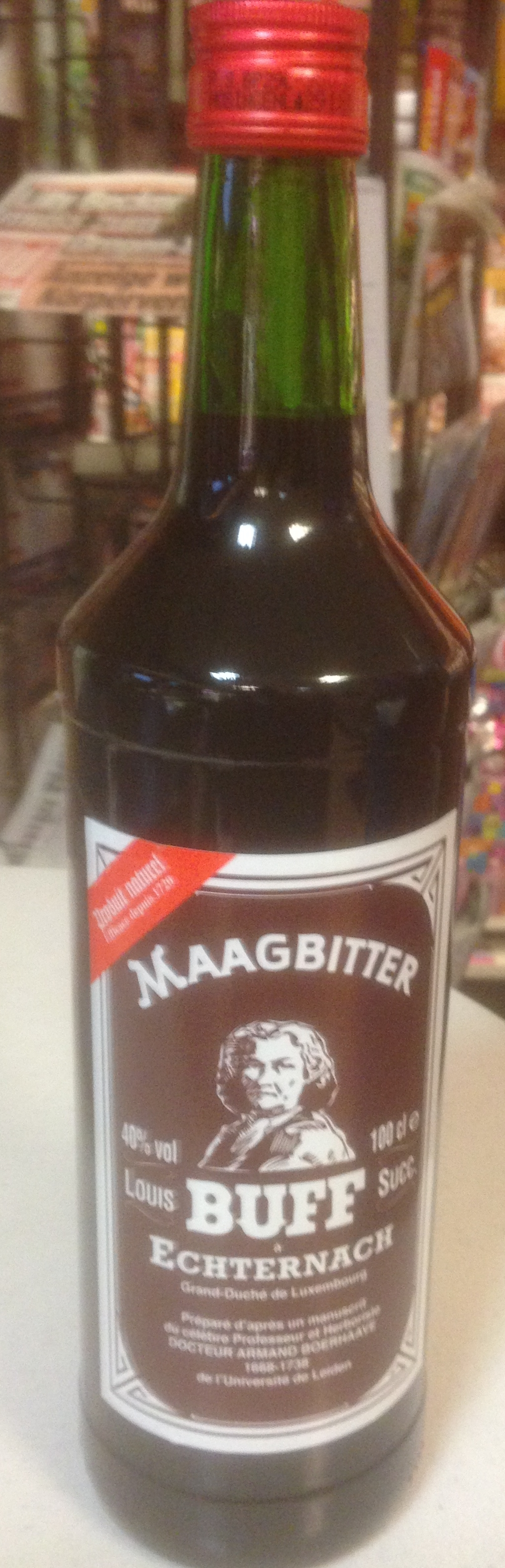 Luxemburgischer Magenbitter der Marke Buff